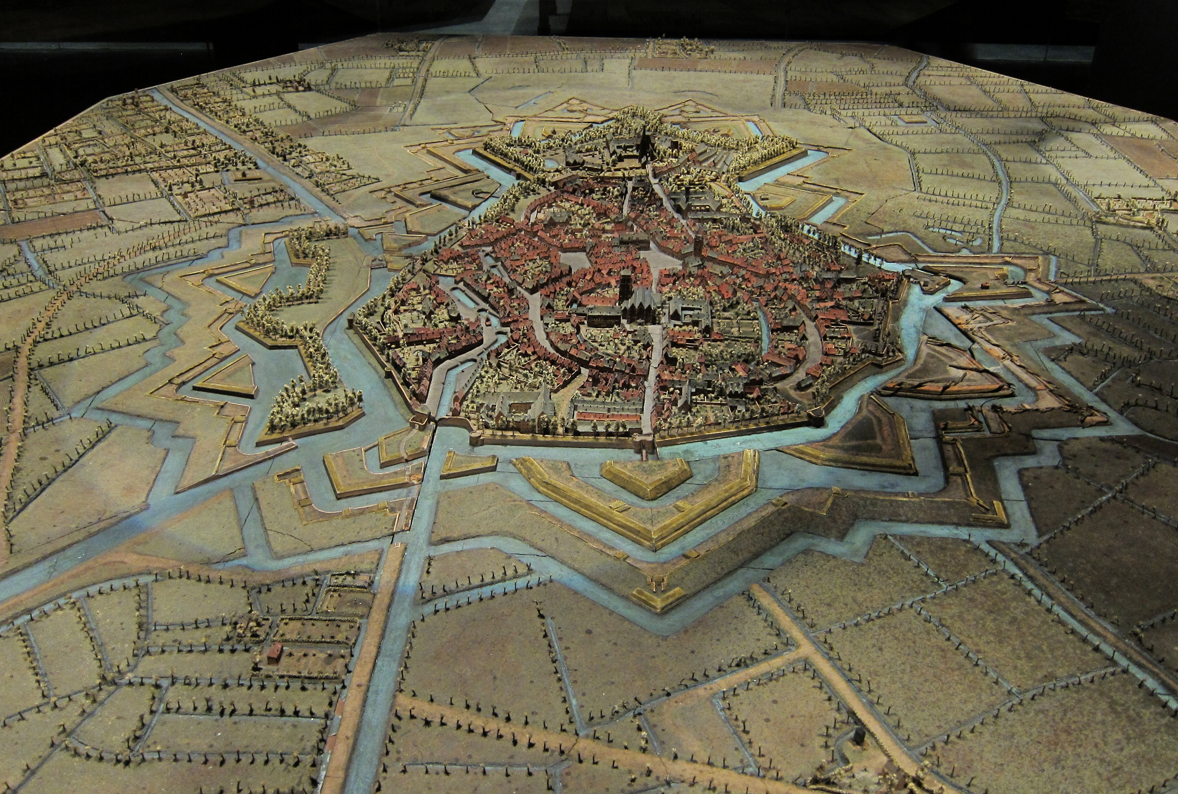 Plan relief de Bergues au Palais des Beaux-arts de Lille.